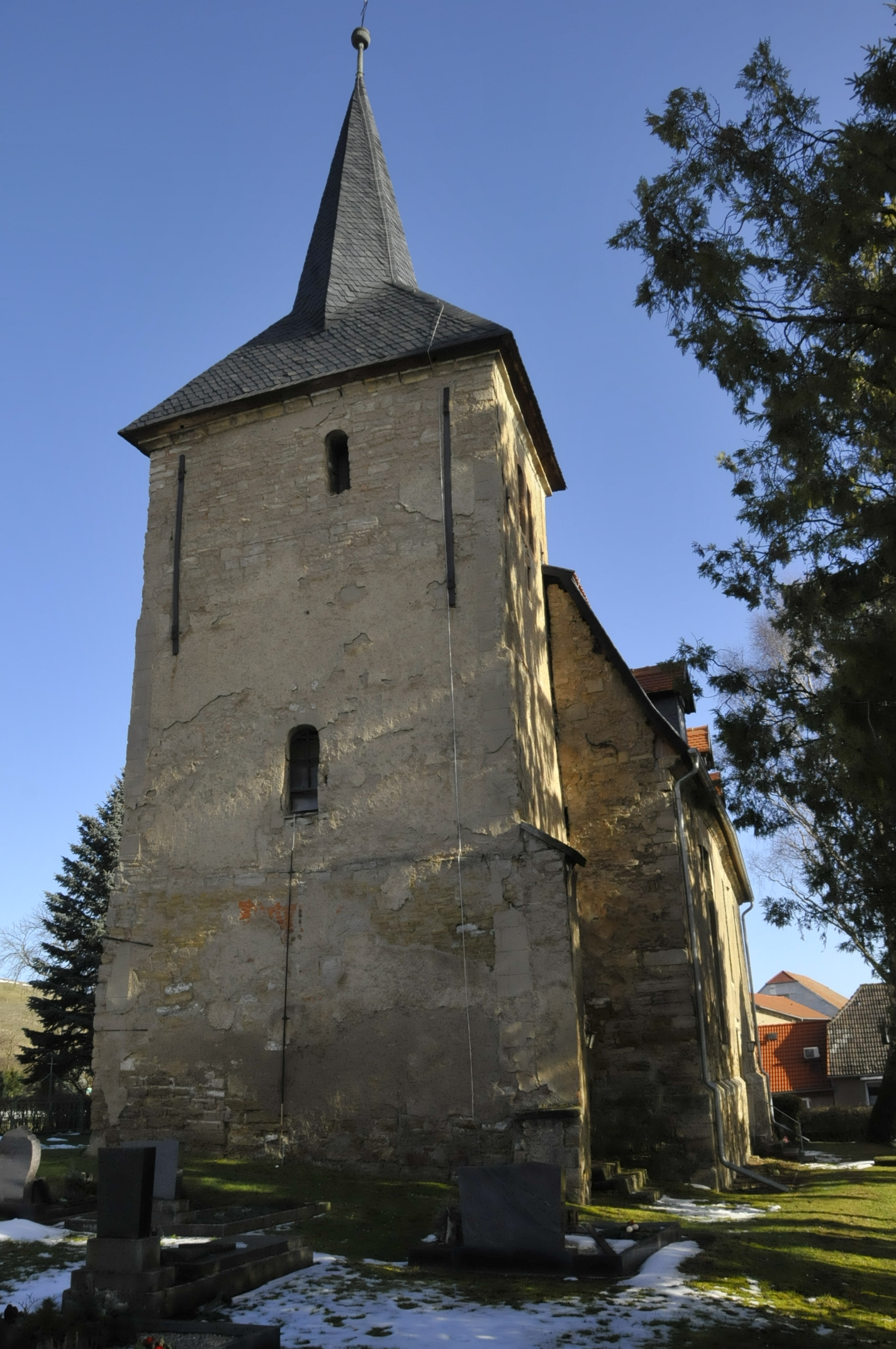 Nausiß, Kirche